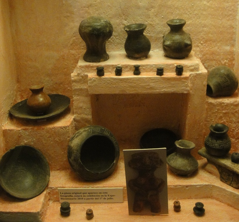 Template:Plazuelas ceramic